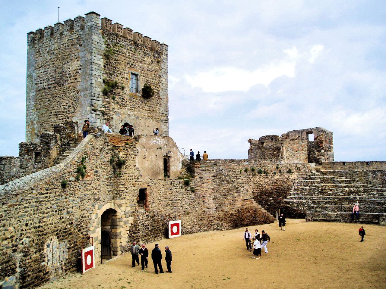 Monsaraz Castle, Portugal